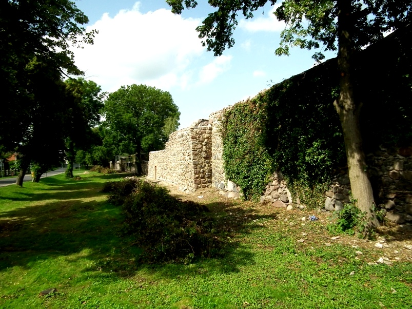 mury obronne w Trzcińsku Zdroju